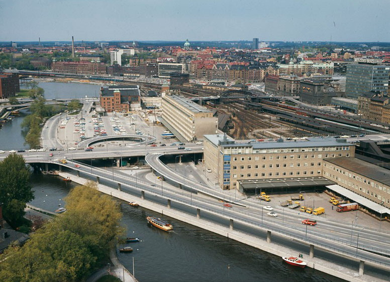 Utsikt från Stadhustornet mot Klara Sjö, Klarastrandsleden, Bangårdspostkontoret, Centralsaluhallen och vidare norrut